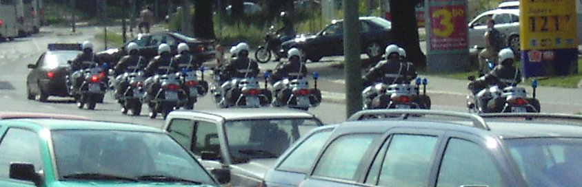 Eskortefahrer der Feldjägertruppe (Julius-Leber-Kaserne, Berlin)